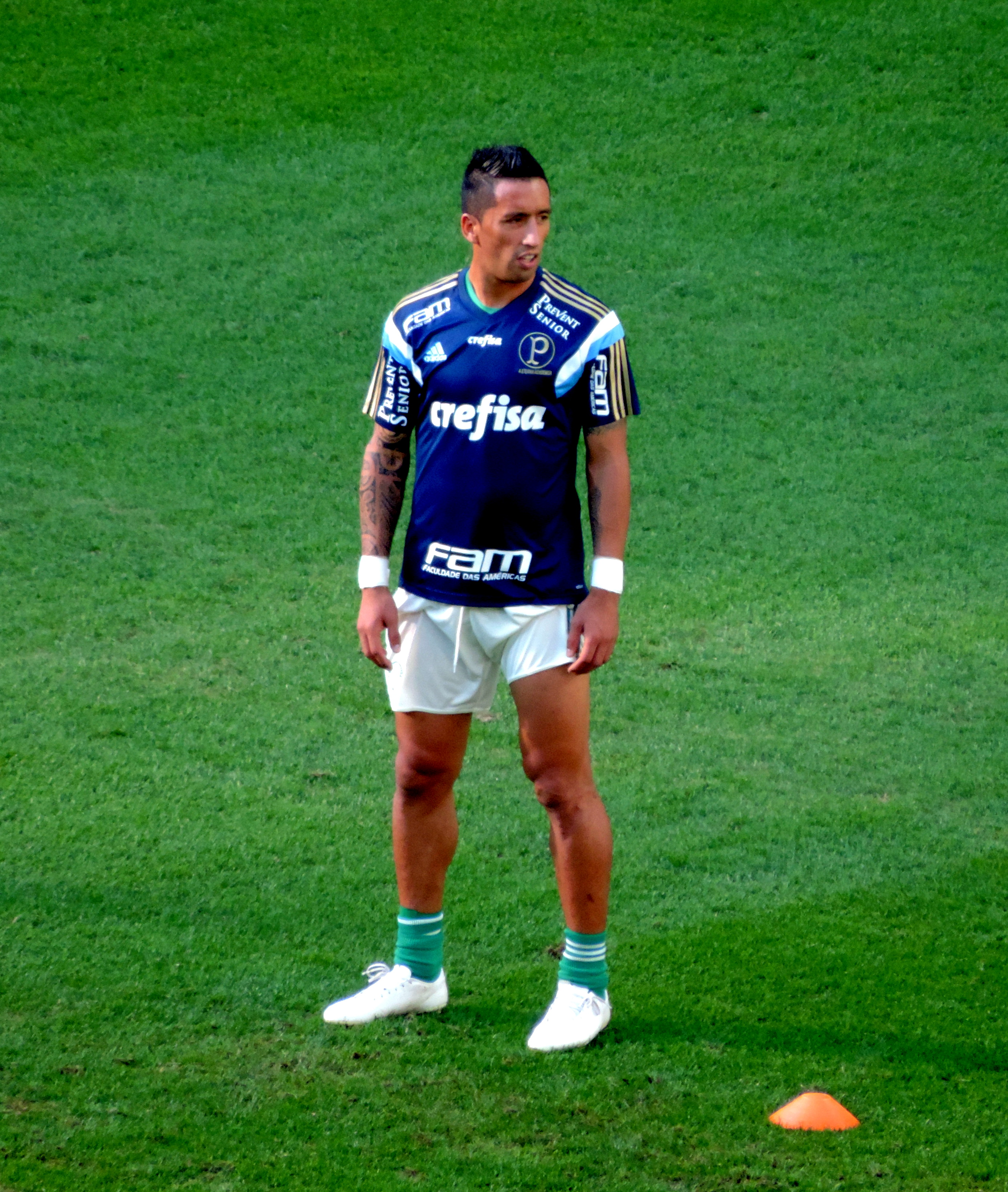 Foto: Roberto Sabino